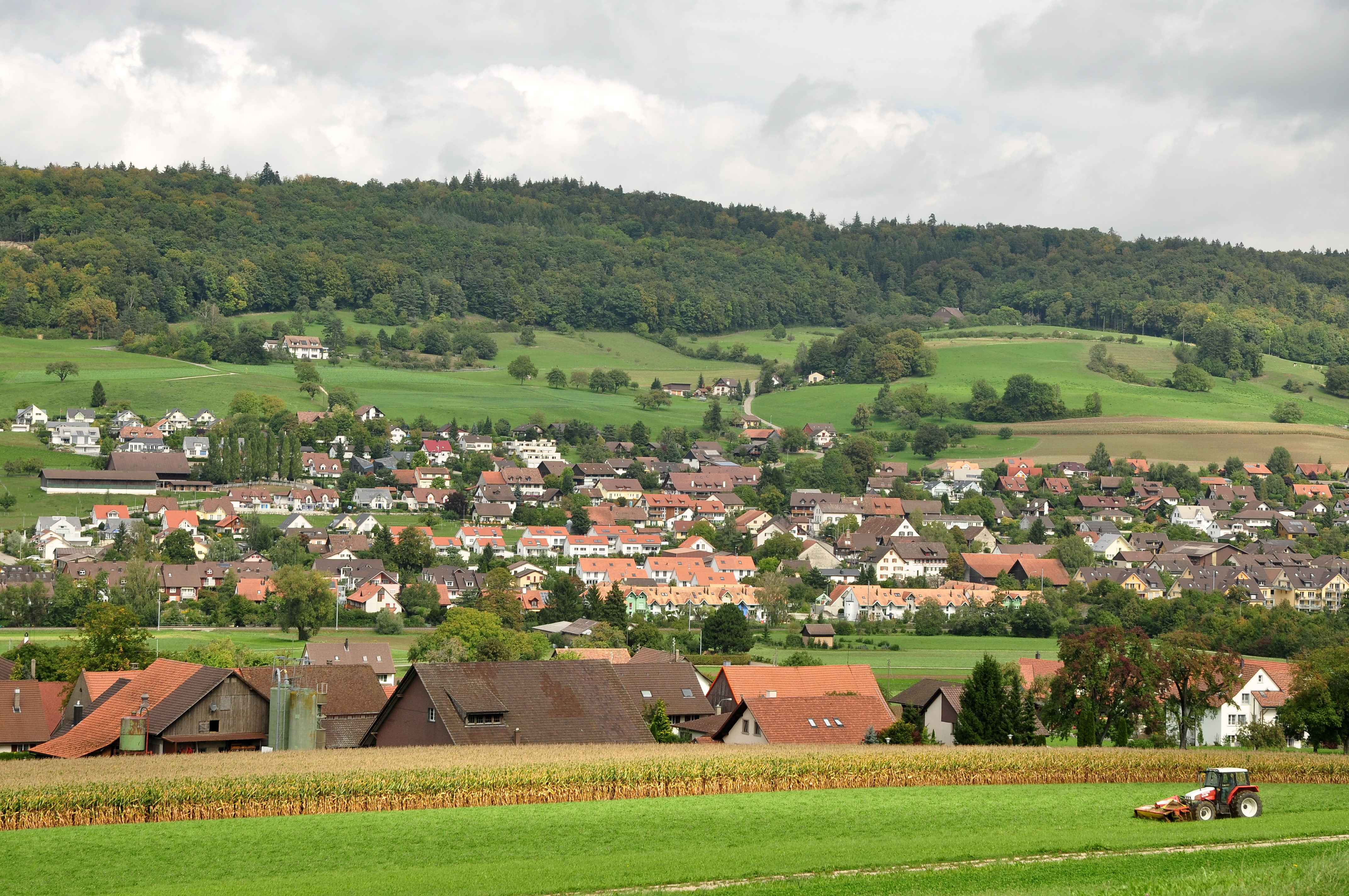 Oberweningen & Schleinikon (Switzerland)